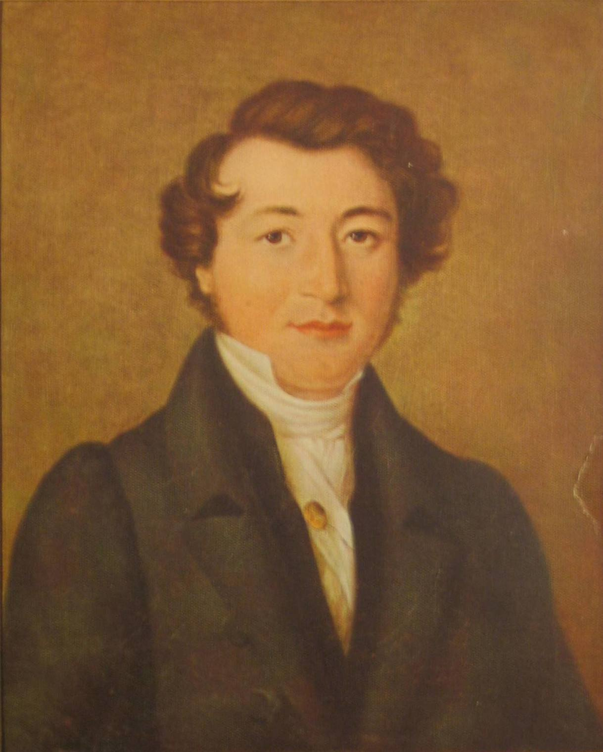 Christia Friedrich Ludwig Buschmann, Musikinstrumentenmacher, Ölgemälde von Cornelius Suhr, Hamburg